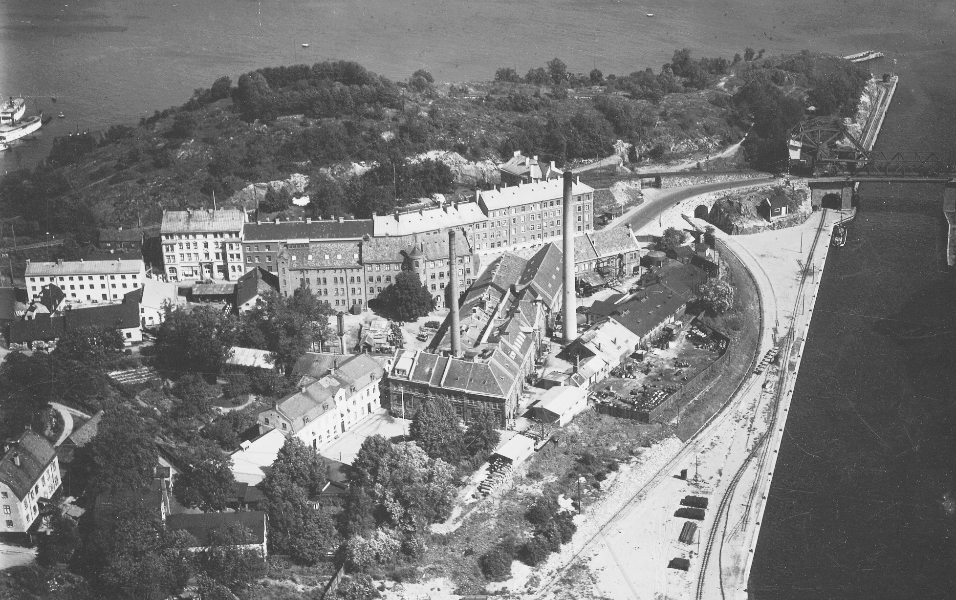 Flygfoto över Liljeholmens stearinfabrik på Södermalm